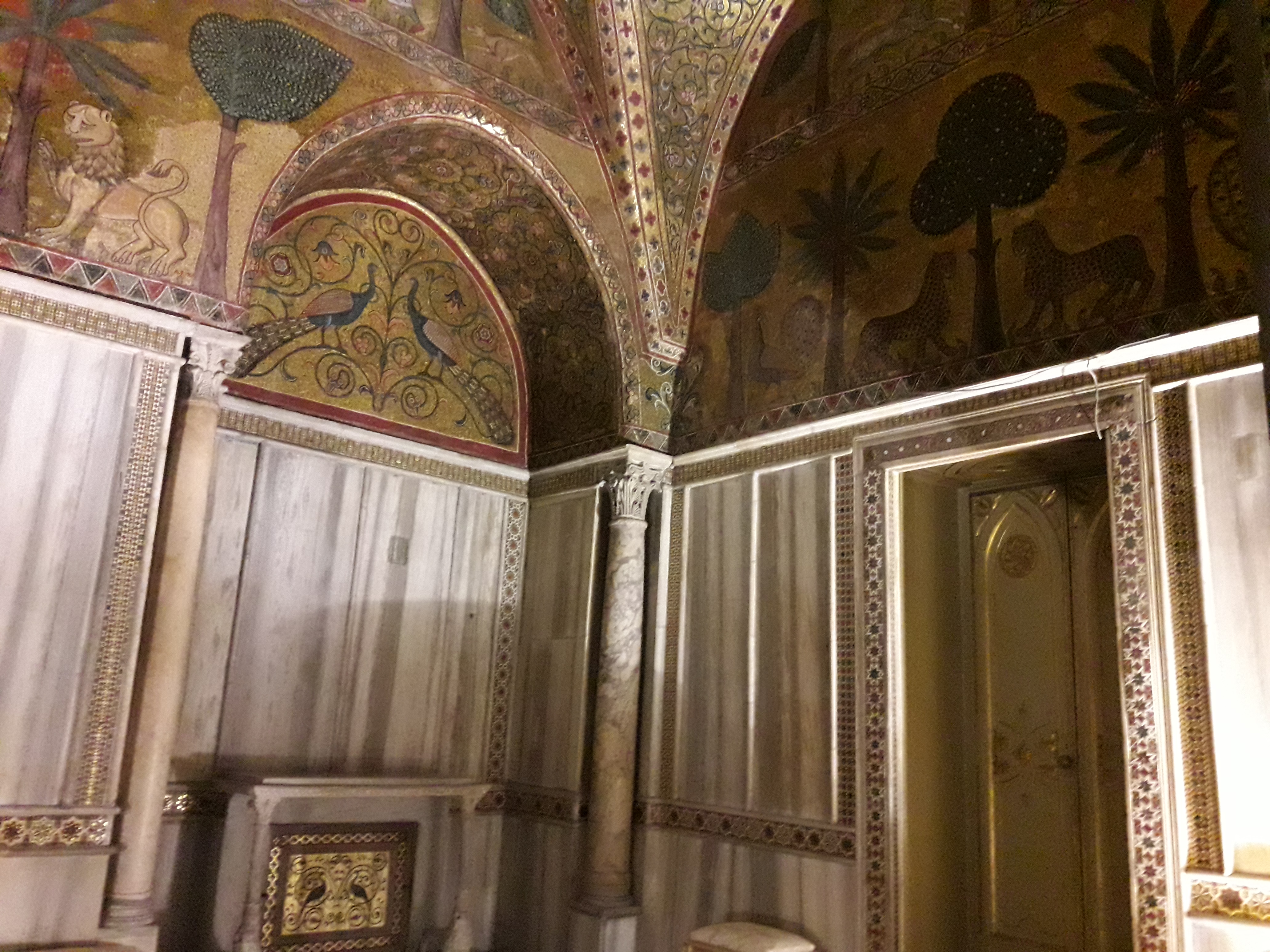 La Sala di re Ruggero, Palazzo dei Normanni